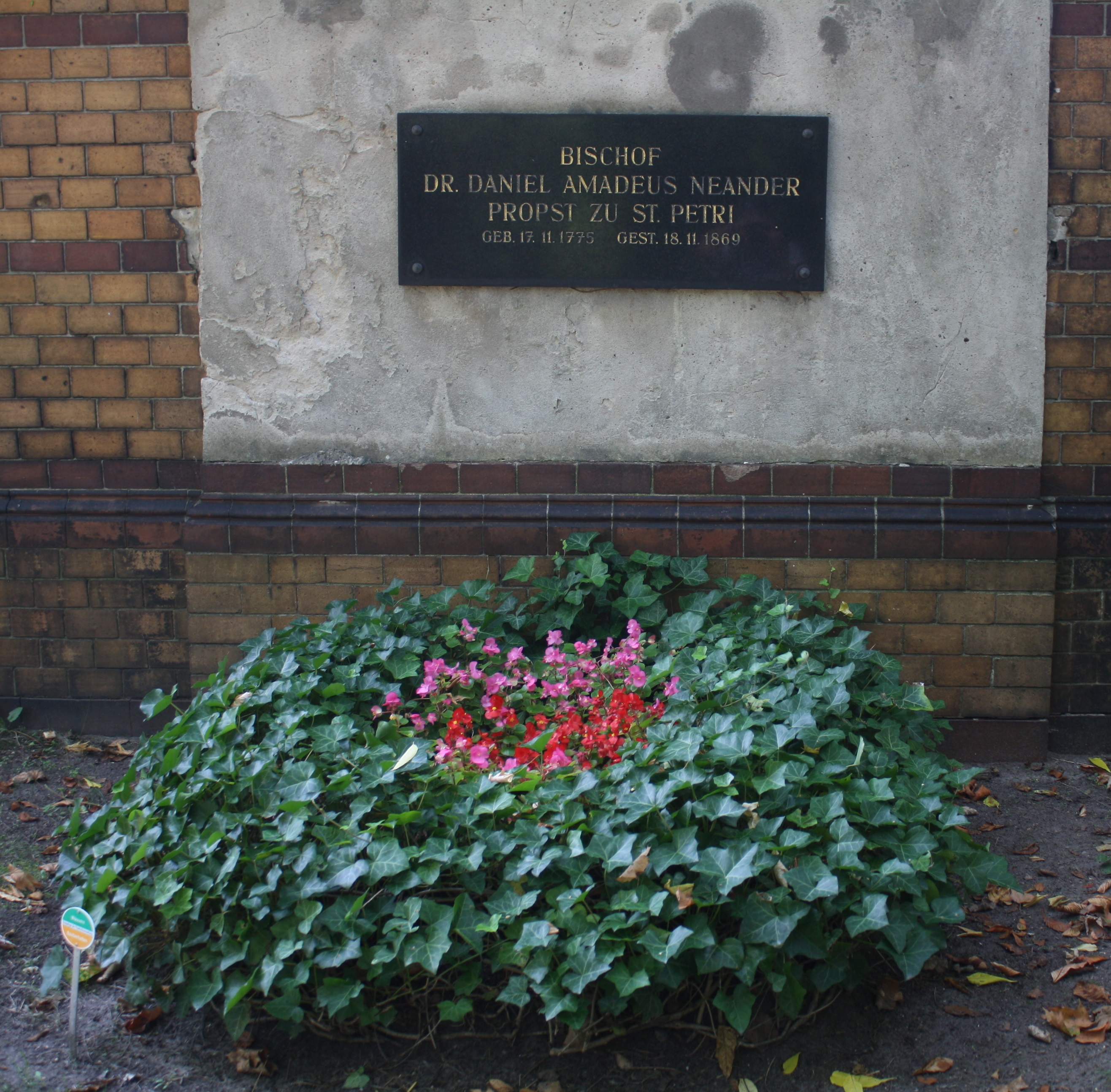 Grabmal Daniel Amadeus Neanders auf dem St. Petri-Luisenstadt-Kirchhof, Friedrichshain, Berlin